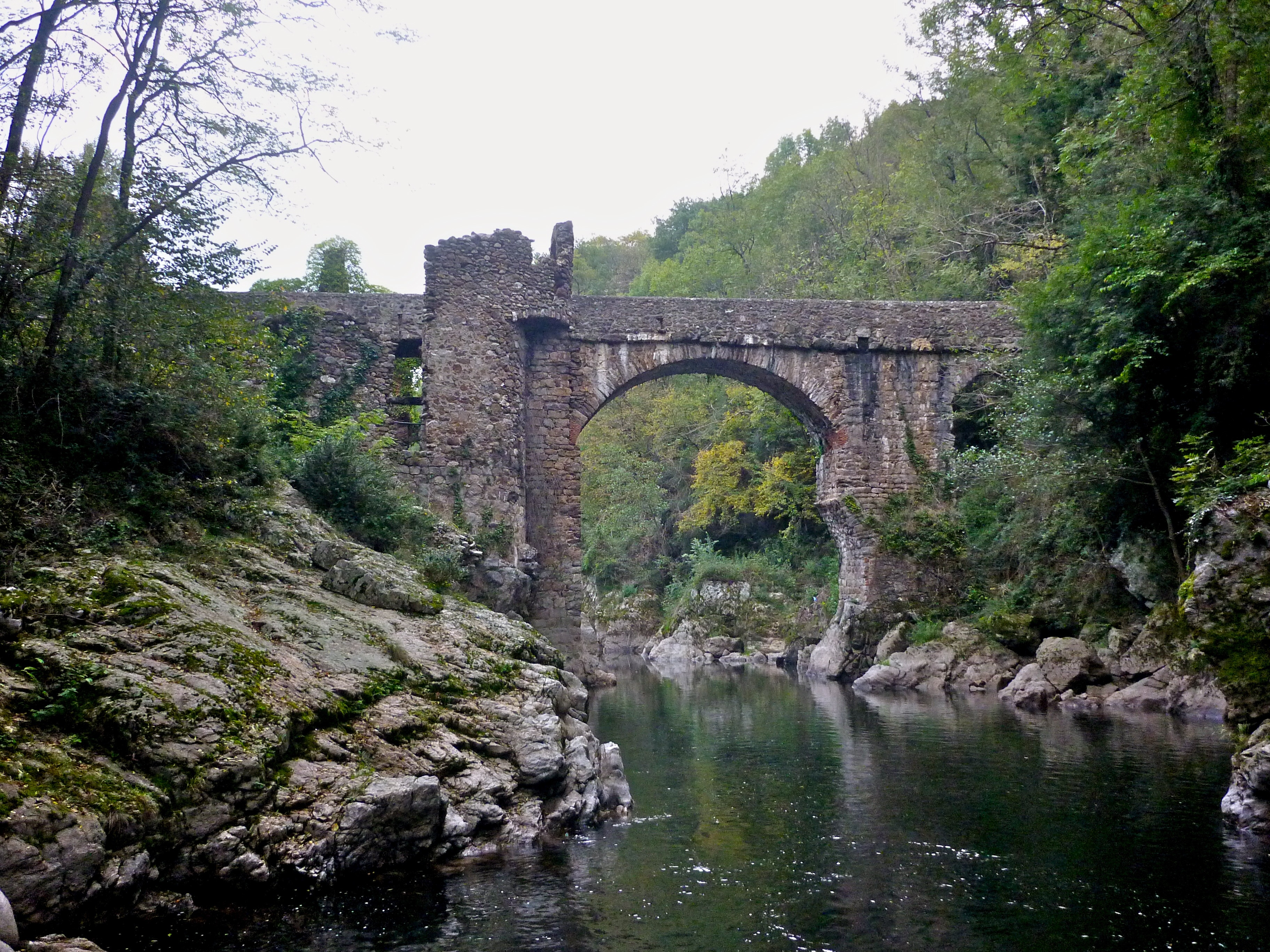 le pont du diable à Mercus-Garrabet (Ariège)